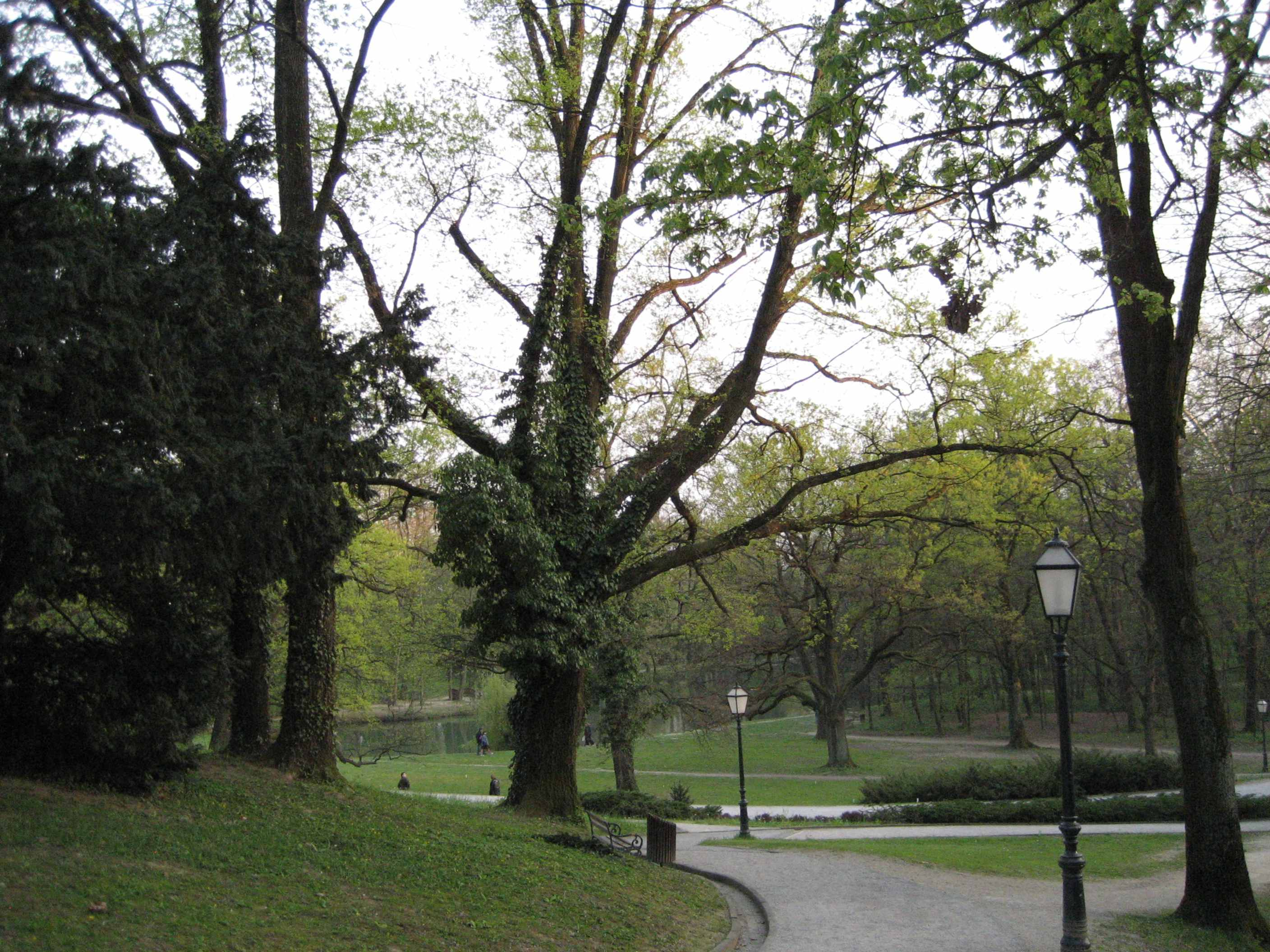 Park Maksimir